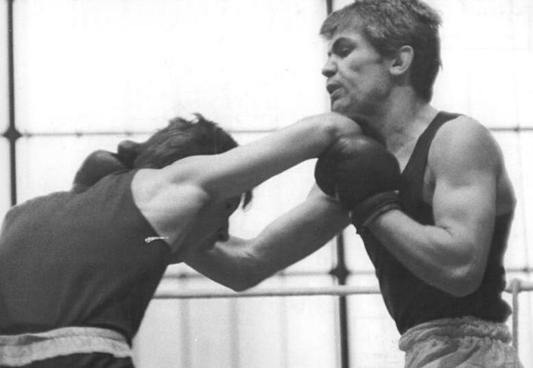 Heiko Winter, Werner Busse Zentralbild Studré 31.5.1964 Schwerin: Olympia-Ausscheidungskämpfe im Boxen In der Schweriner Sport- und Kongress-Halle wurden am 30.5.64 die ersten fünf Box-Fahrkarten nach Tokio verteilt. Mit Otto Babiasch, Heinz Schulz, Heiko Winter und Jürgen Schlegel qualifizierten sich bereits 4 DDR-Boxer für das olympische Turnier. Den 5. Platz erkämpfte sich der westdeutsche Paul Hogh. UBz: In der "internen" Auseinandersetzung zwischen 2 DDR-Boxern schenkten sich die Halbweltergewichtler Heiko Winter (links) und Werner Busse nichts. Winter suchte stets den Angriff und hatte im Schlagabtausch leichte Vorteile. Er wurde einstimmiger Punktsieger.